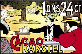 Affiche Karstel Cacao